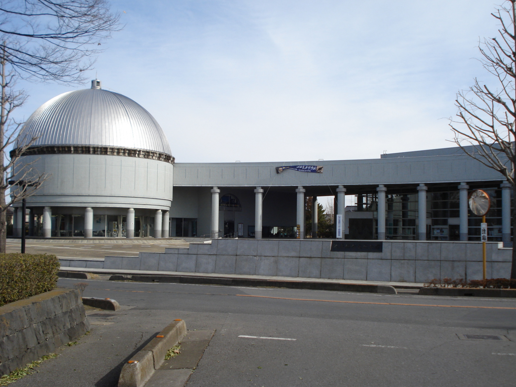 久喜総合文化会館 外観（埼玉県久喜市）